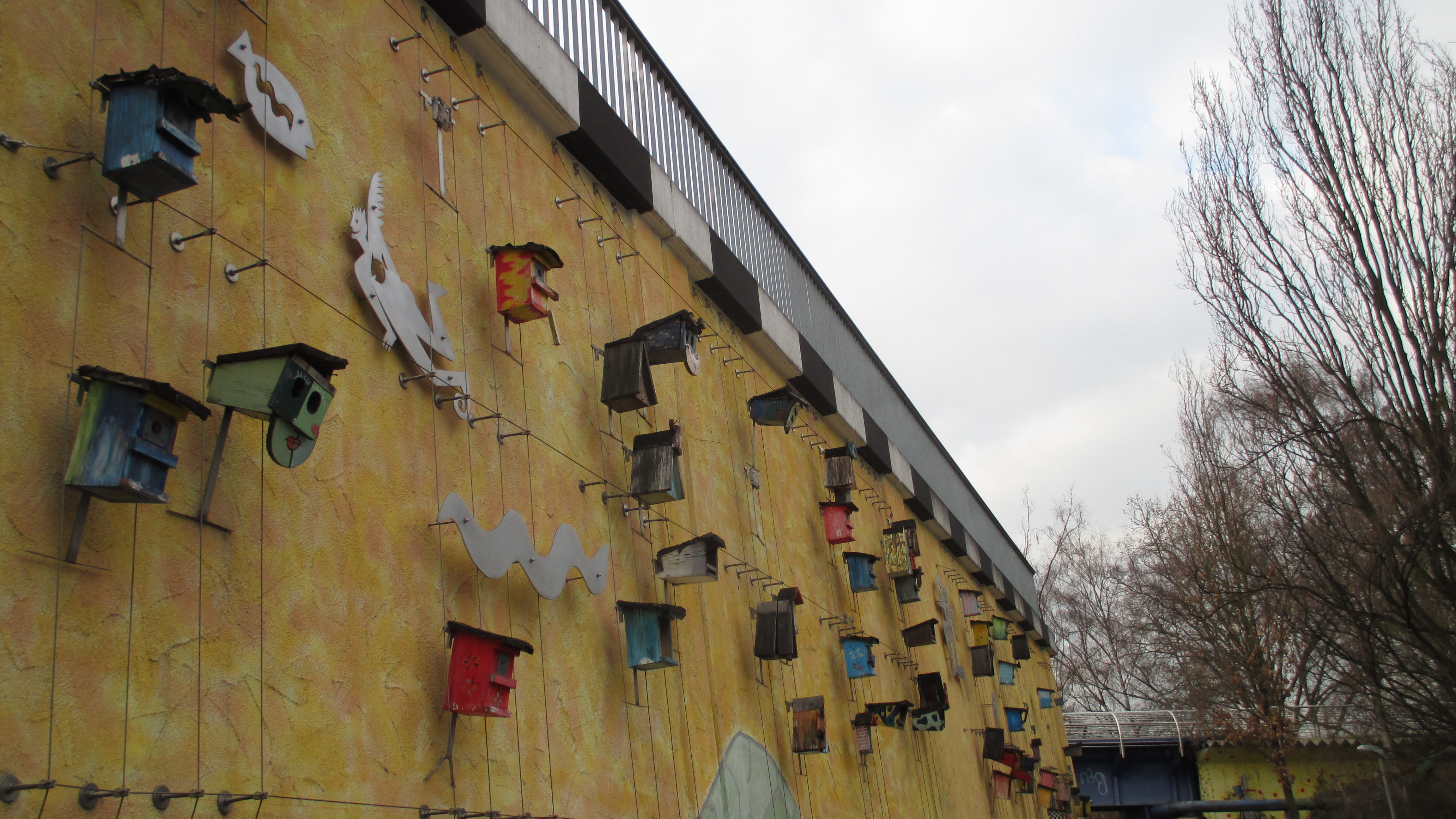 Farbenfrohe Gestaltung der Mauer an Zeche Zollverein Schacht 3/7/10 von Moni van Rheinberg und den Künstlerinnen Gine Selle und Claudia Terlunen. Neben graphischen Elementen enthält das 270 m lange Kunstwerk auch Stahlfiguren und Nistkästen für Vögel und Insekten. Es entstand 2001.